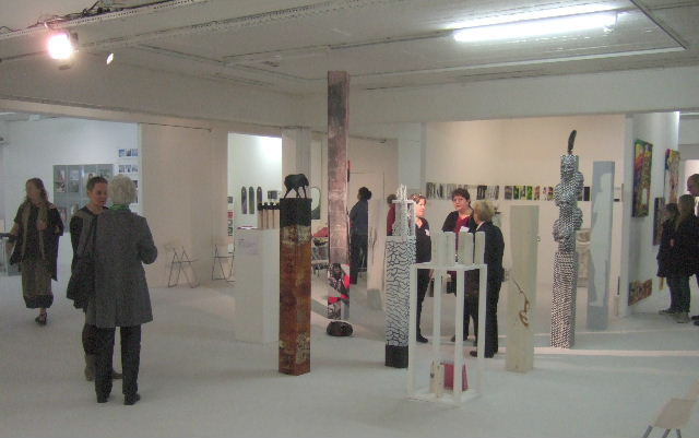 Frauenmesse im Frauenmuseum, Bonn, Deutschland